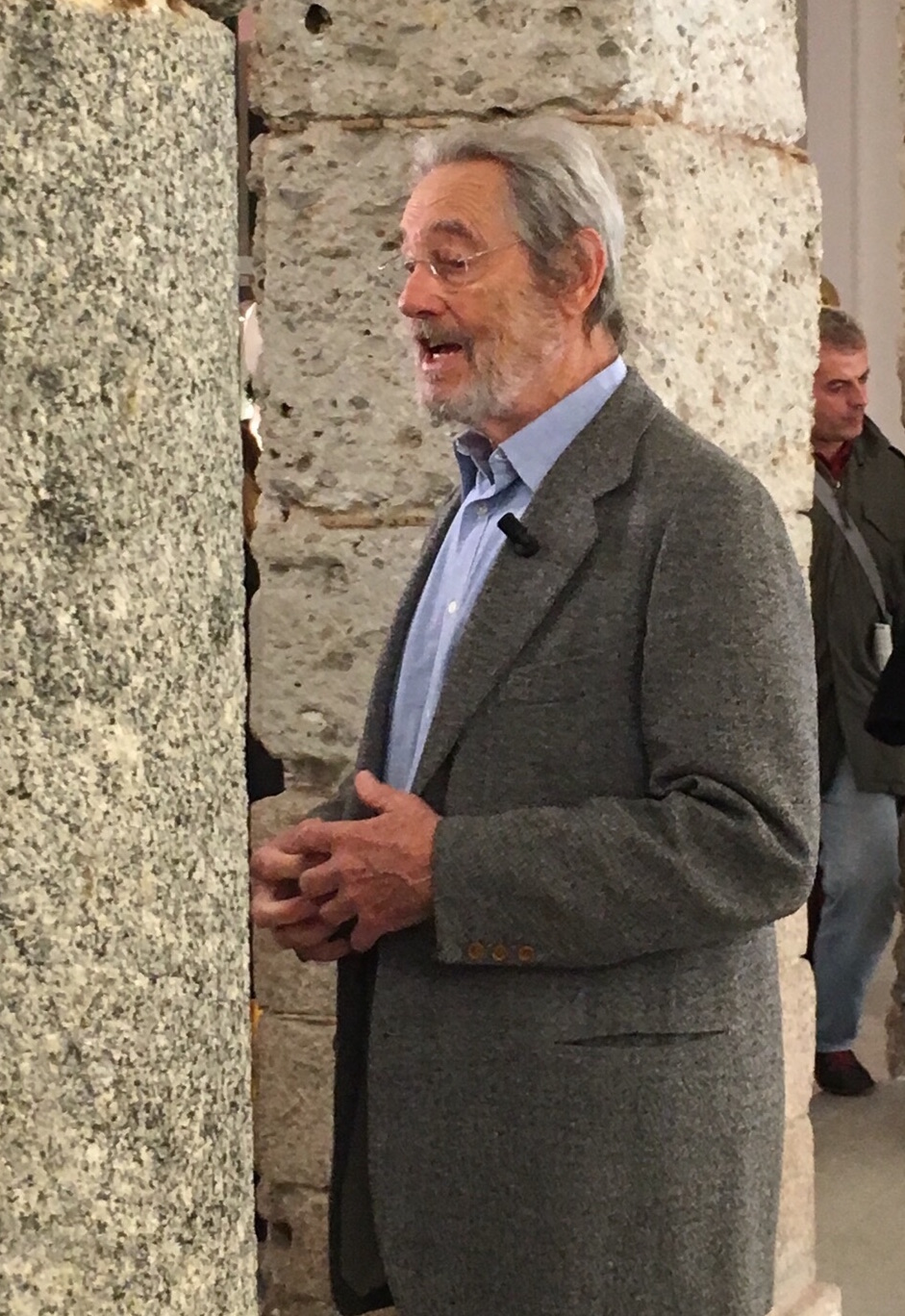 Tobia Scarpa alla presentazione del suo libro a Milano nell'ottobre 2015